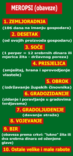 Meropsi i njihove obaveze.